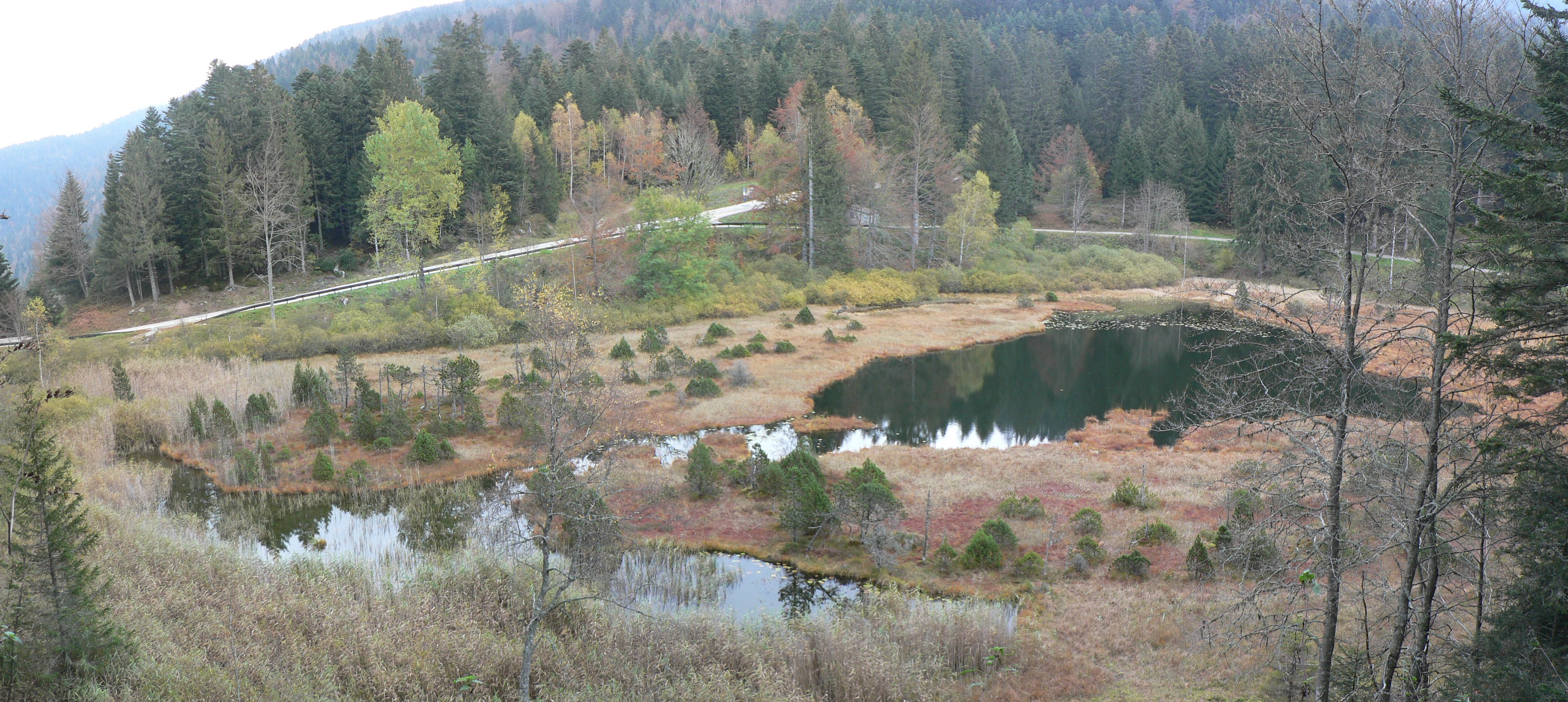 Lac du Luitel, près d'Uriage